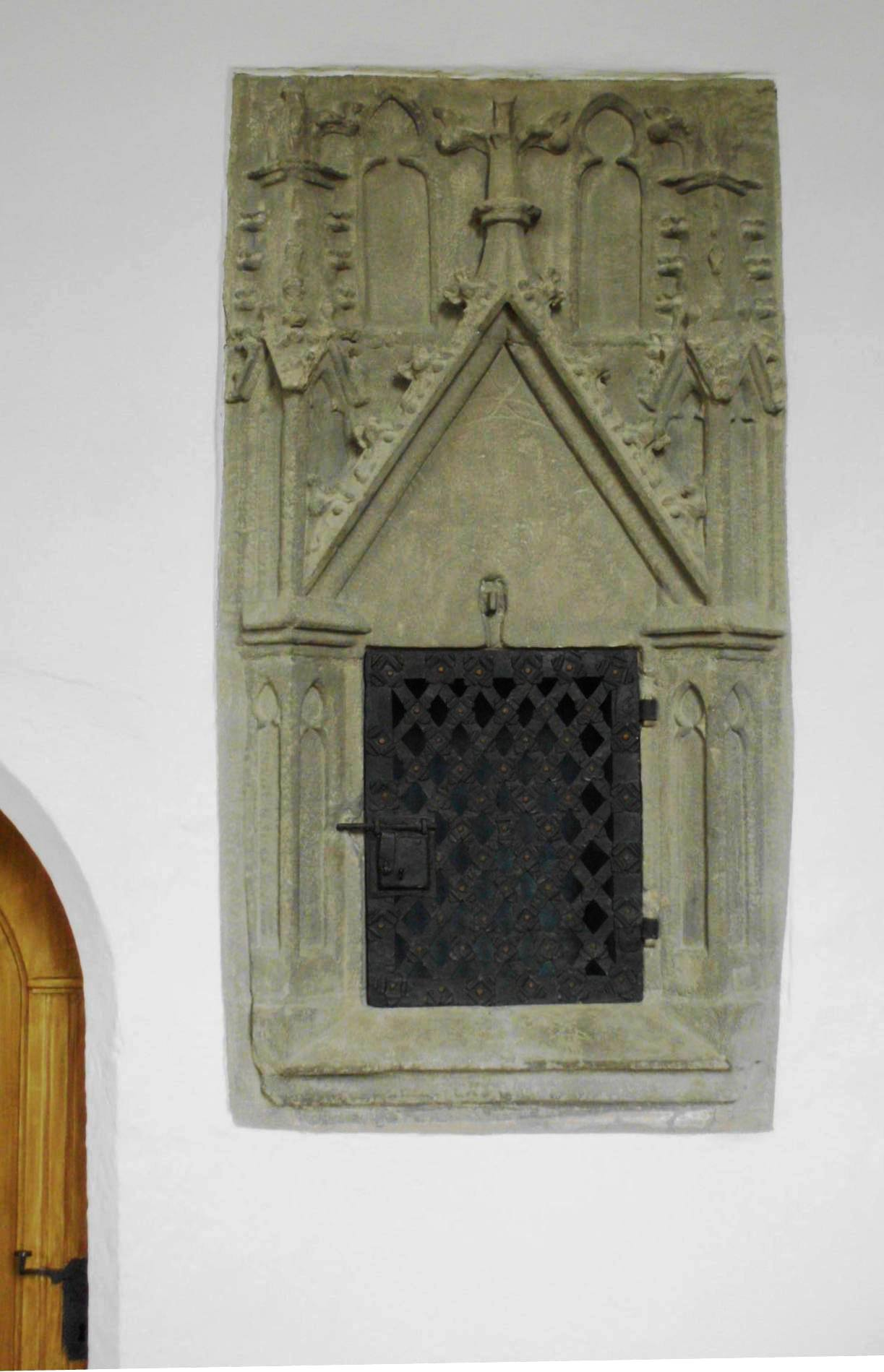 Trommetsheim, Gemeinde Alesheim im Landkreis Weißenburg-Gunzenhausen (Bayern), evang.-luth. Pfarrkirche St. Emmeram, gotische Sakramentsnische